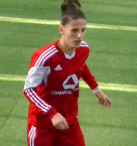 Valentina Limani (1. FFC Frankfurt II) beim SAP Frauen-FußballCup 2017